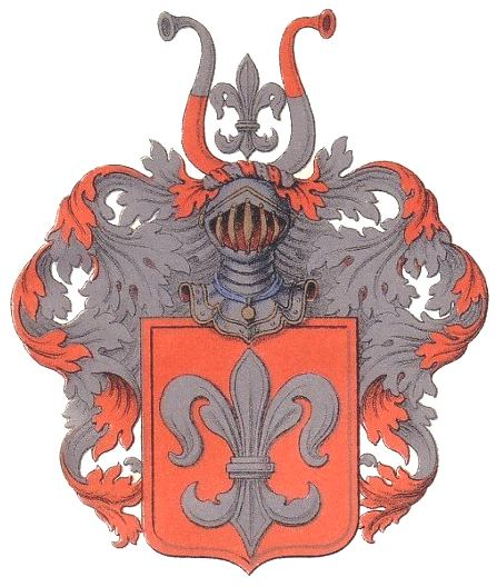 Wappen derer von Bardenfleth Beschreibung bei Nöthige Supplemente zu dem Großen Vollständigen UNIVERSAL LEXICON Aller Wissenschaften und Künste, Welche bishero durch menschlichen Verstand und Witz erfunden und verbessert worden: Barc-Bod. Dritter Band; Leipzig 1752; Seite 13